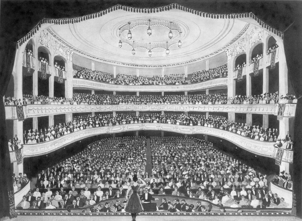 Zuschauerraum des Wuppertaler Thalia-Theaters in einem Prospekt zur Eröffnung 1906